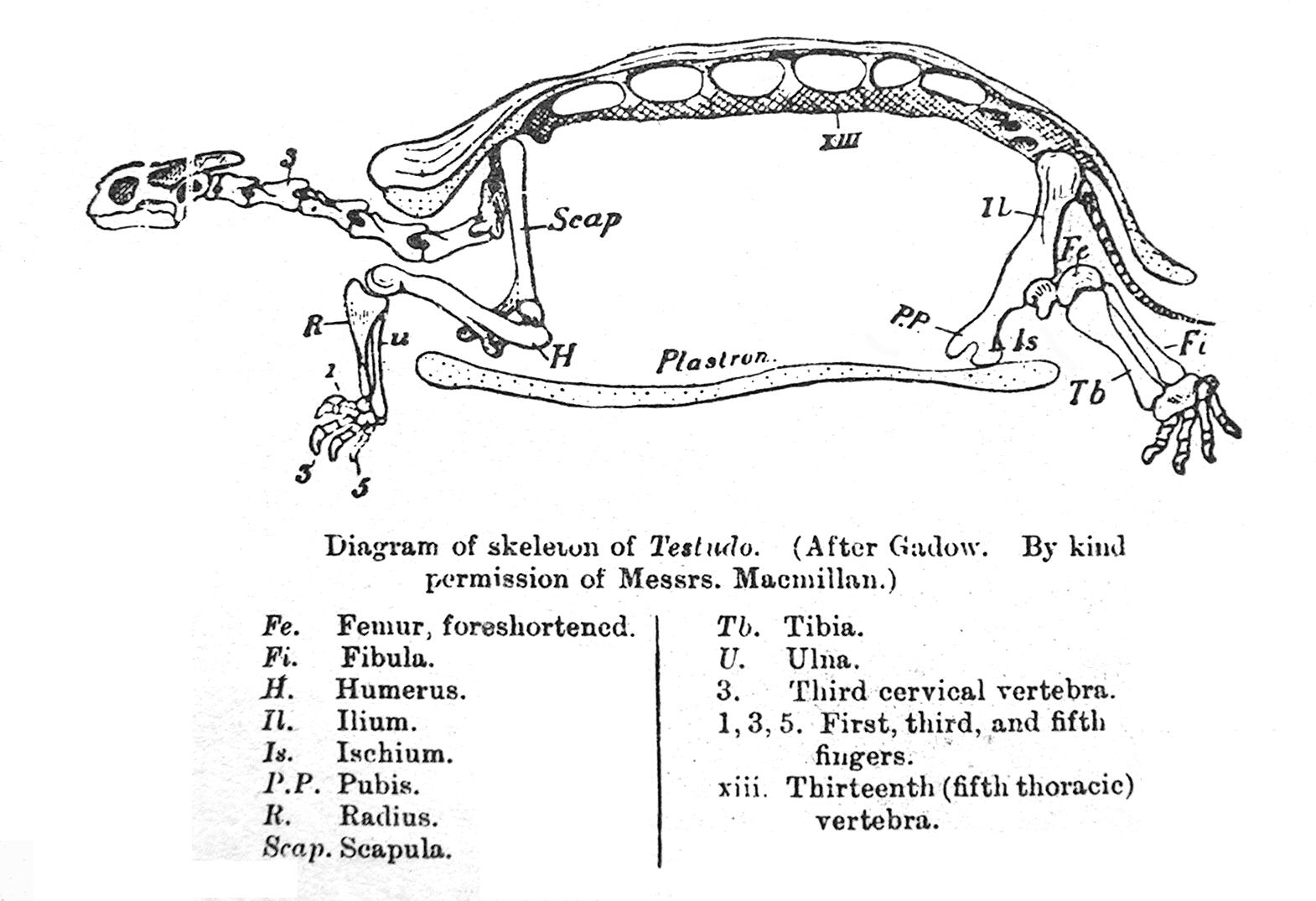 Skeleton of Testudo tortoise